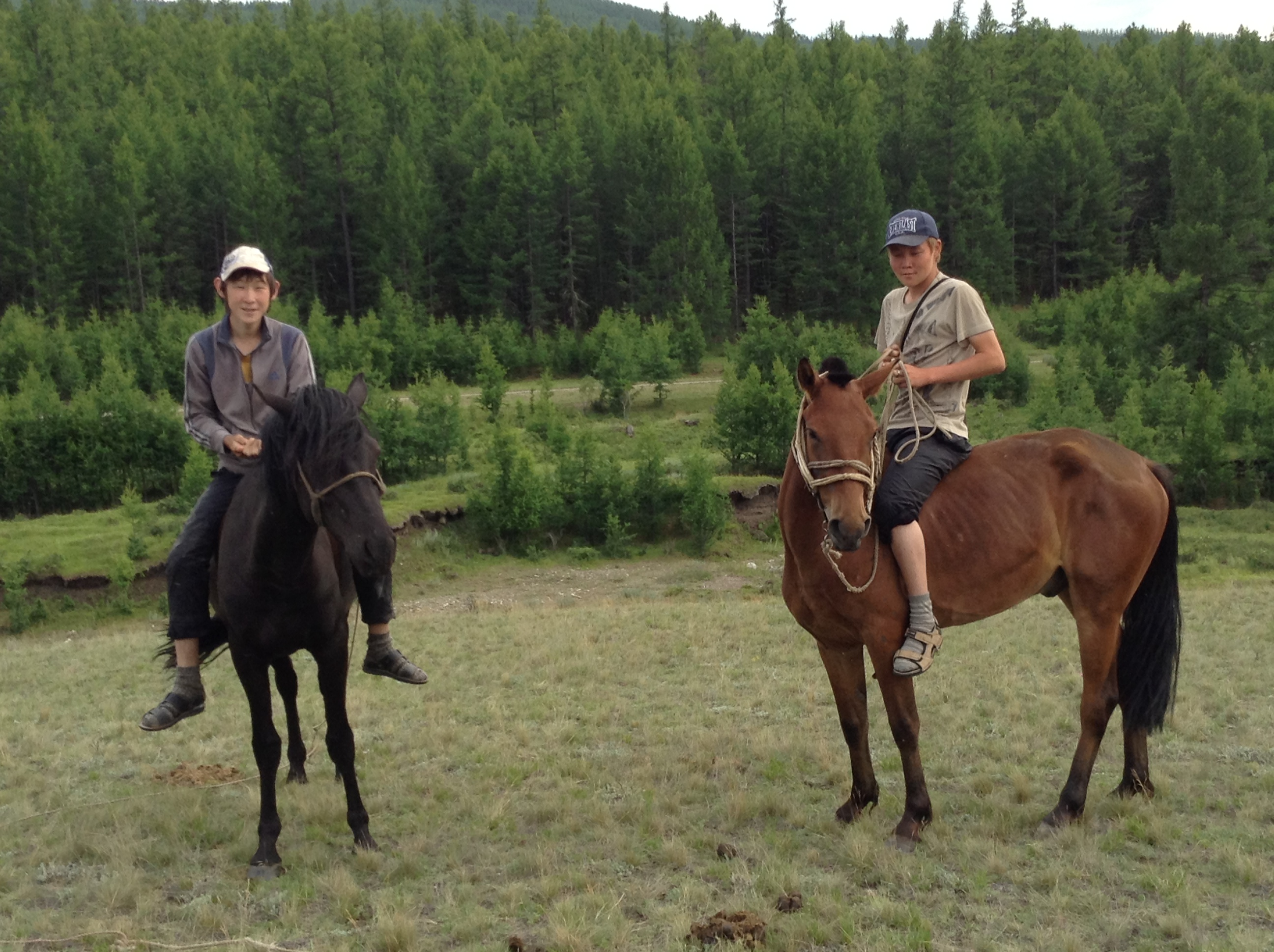 Тыва дыл: Адар-Төш, Чөөн-Хемчик.